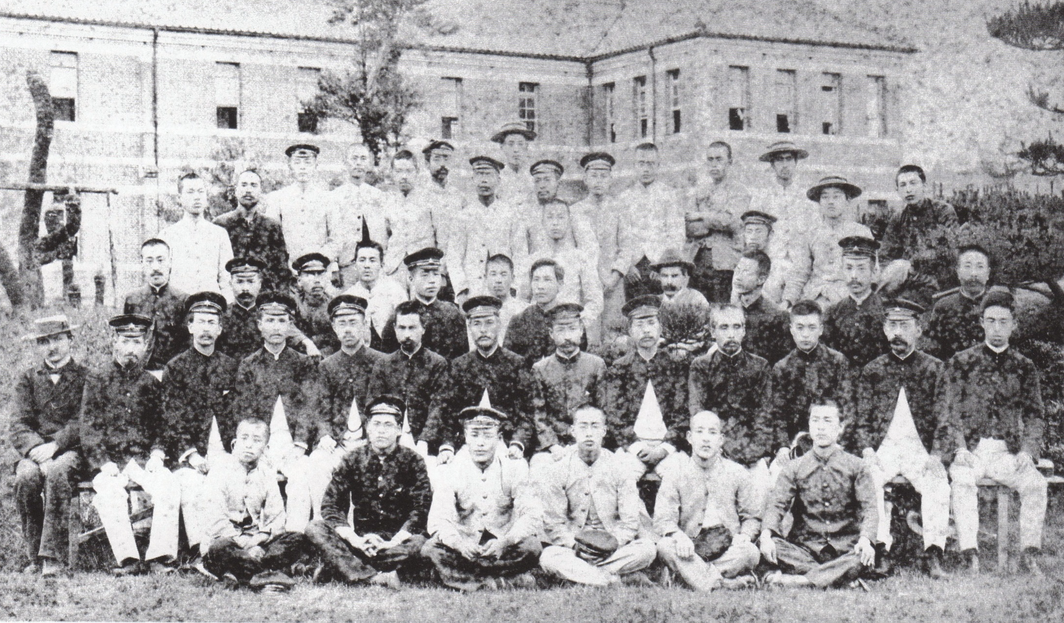 1900年（明治33年）5月の第五高等学校教授陣と学生たちの写真 第1列右から三沢紏、落合貞三郎、大木俊九郎、戸次正、岡上梁、白仁三郎、第2列会田竜雄、友田鎮三、秋山良三郎、伊東基、武藤虎太、夏目金之助、桜井房記、長谷川貞一郎、小島伊佐美、杉山岩三郎、小島献吉郎、奥太一郎、デルフェル、第3列羽生慶三郎、園哲雄、山田準、ファーデル、遠山参良、堀勝延、島野四平、落合為誠、第4列川淵正韋、平川泉吉、亀田次郎、谷亀雄、堀内収蔵、神田誠太郎、村山憲吉、手塚光貴、今井精一、沼田博雄、森田万次郎、野老山長角、境野正、山形元治、犬丸貞吉、副島松一、湯浅康孫、小磯実、野間真綱 [1]